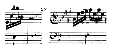 Exemple de guidon, petit signe en bout de ligne pour indiquer la première note sur la portée suivante. Partition manuscrite des Sonates du Rosaire de Biber (1678)